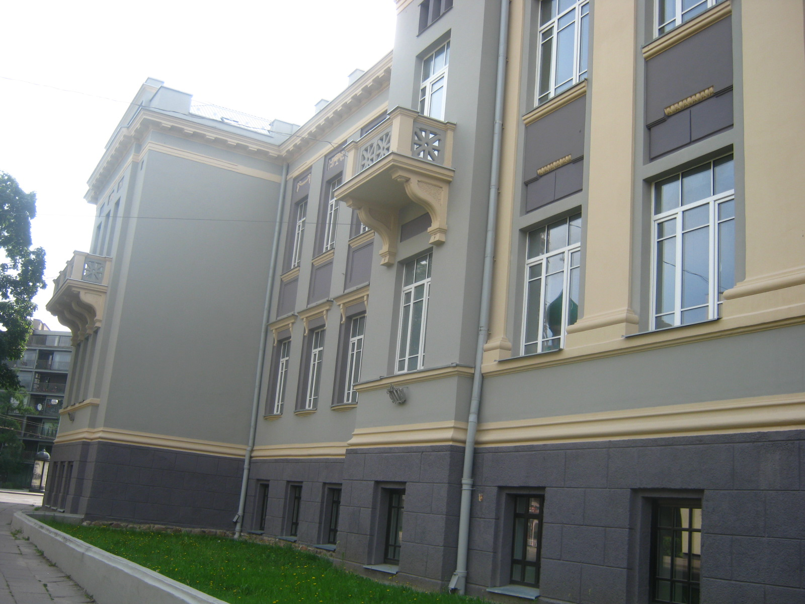 VGTU Mechanikos fakultetas